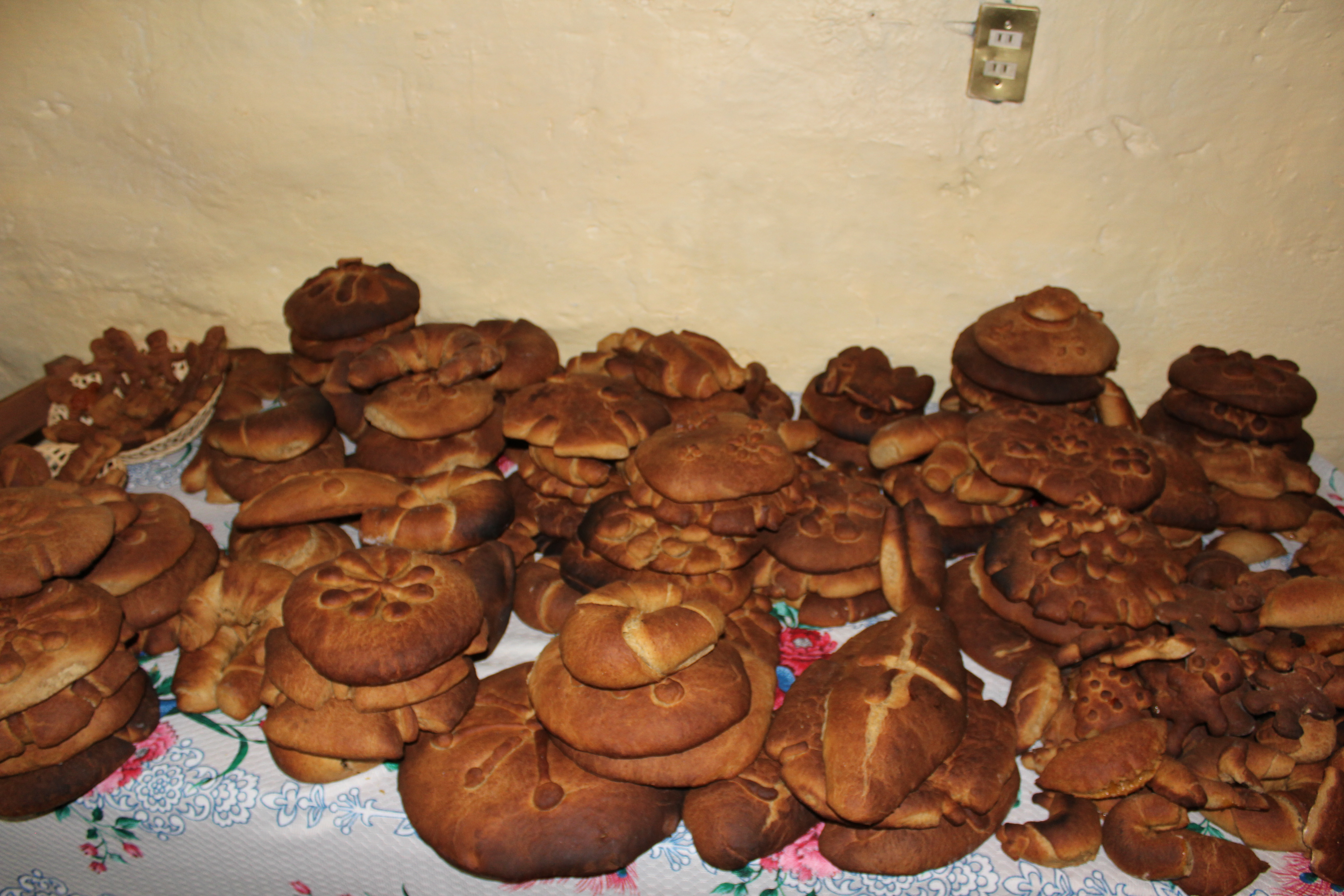 Serie preparación pan de muerto.Pan de muerto tradicional creado por nativos de San Joaquín, Texcoco , Estado de México, hecho de masa compuesta por harina, piloncillo,mantequilla, levadura, guayaba molida y huevo, que fue horneado en un horno de pared, (labrado y sellado con adobe).